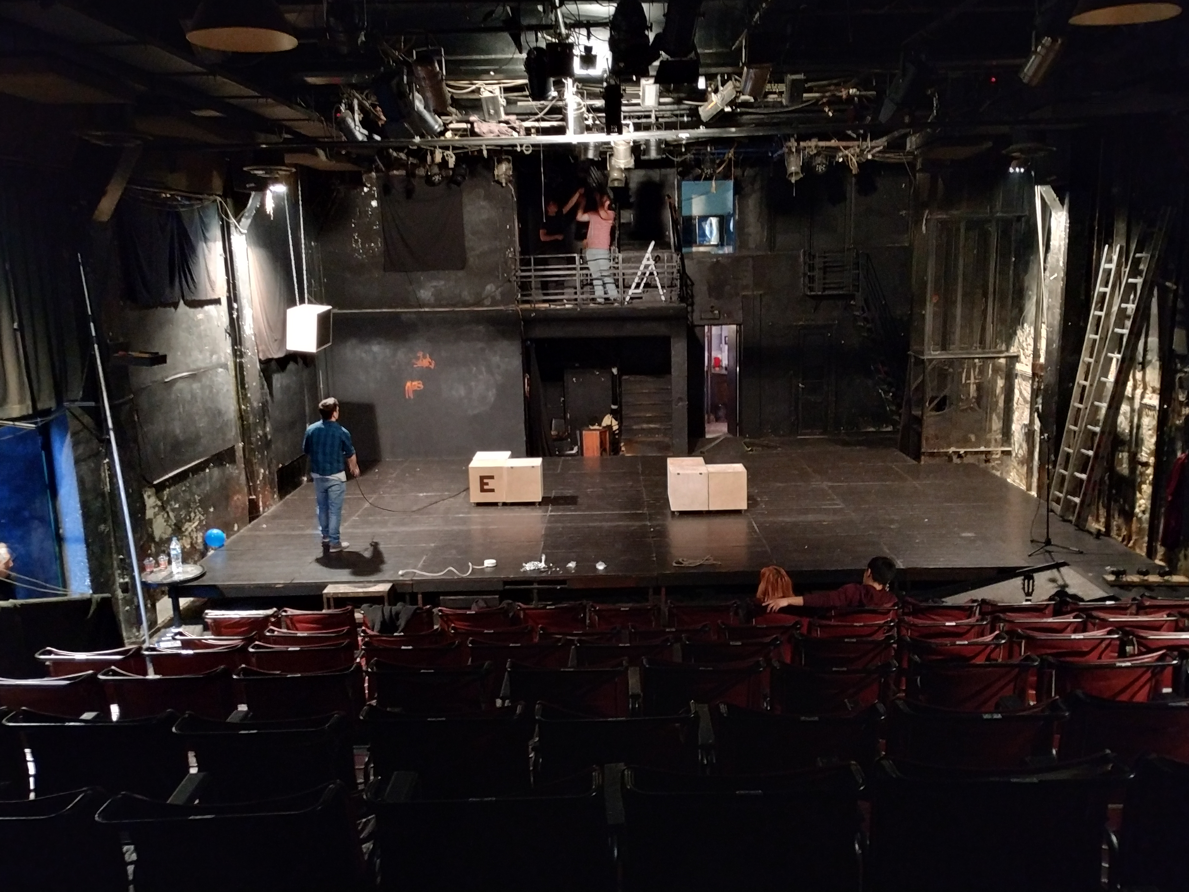 Εσωτερικό του Θεάτρου